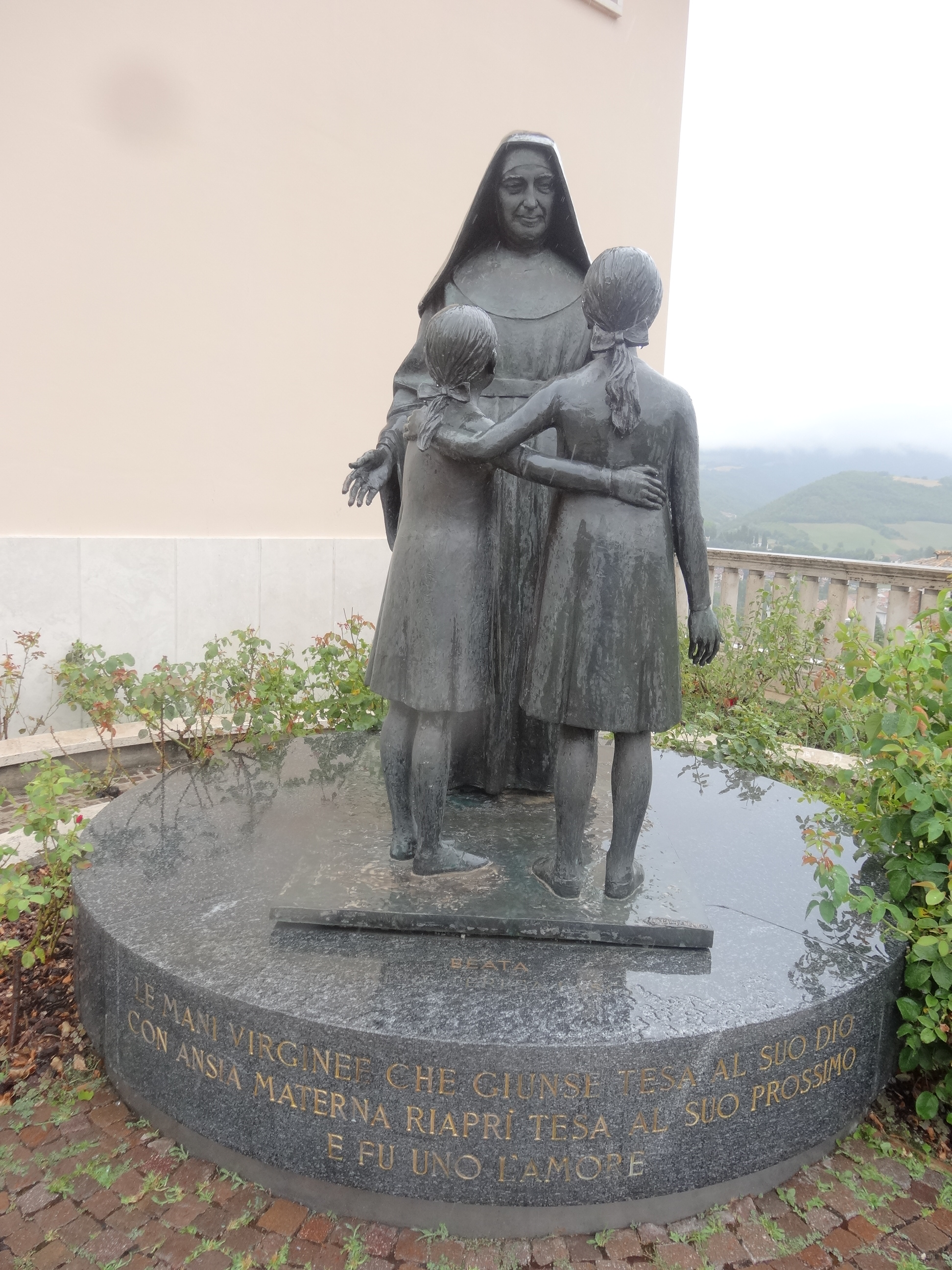 Santuario di Santa Rita (Cascia). Monumento alla Madre Teresa Fasce, Maria Giovanna Fasce.